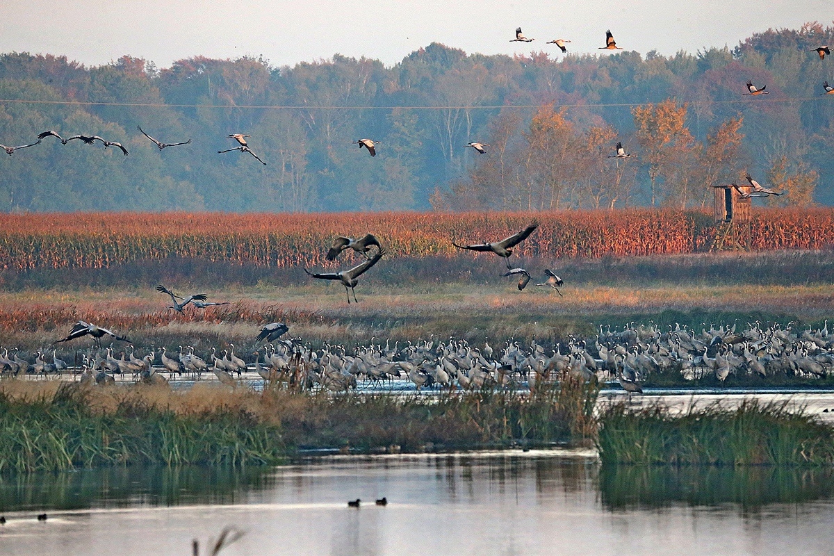 Aufbrechende Kraniche bei Tagesanbruch in Mecklenburg